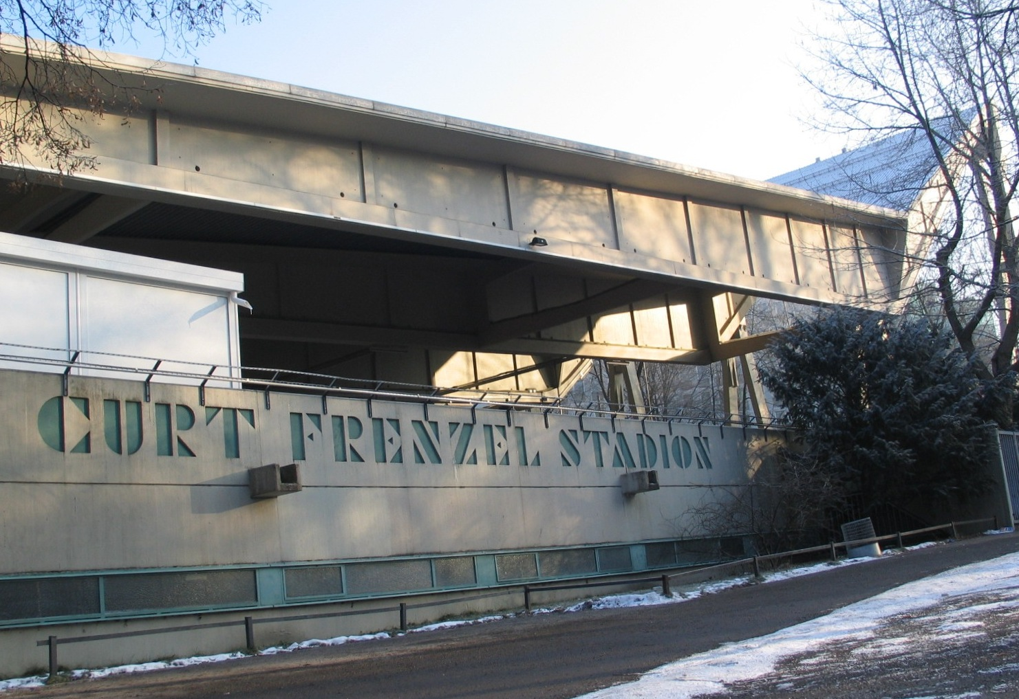 Augsburg, Curt-Frenzel-Stadion, Namenszug